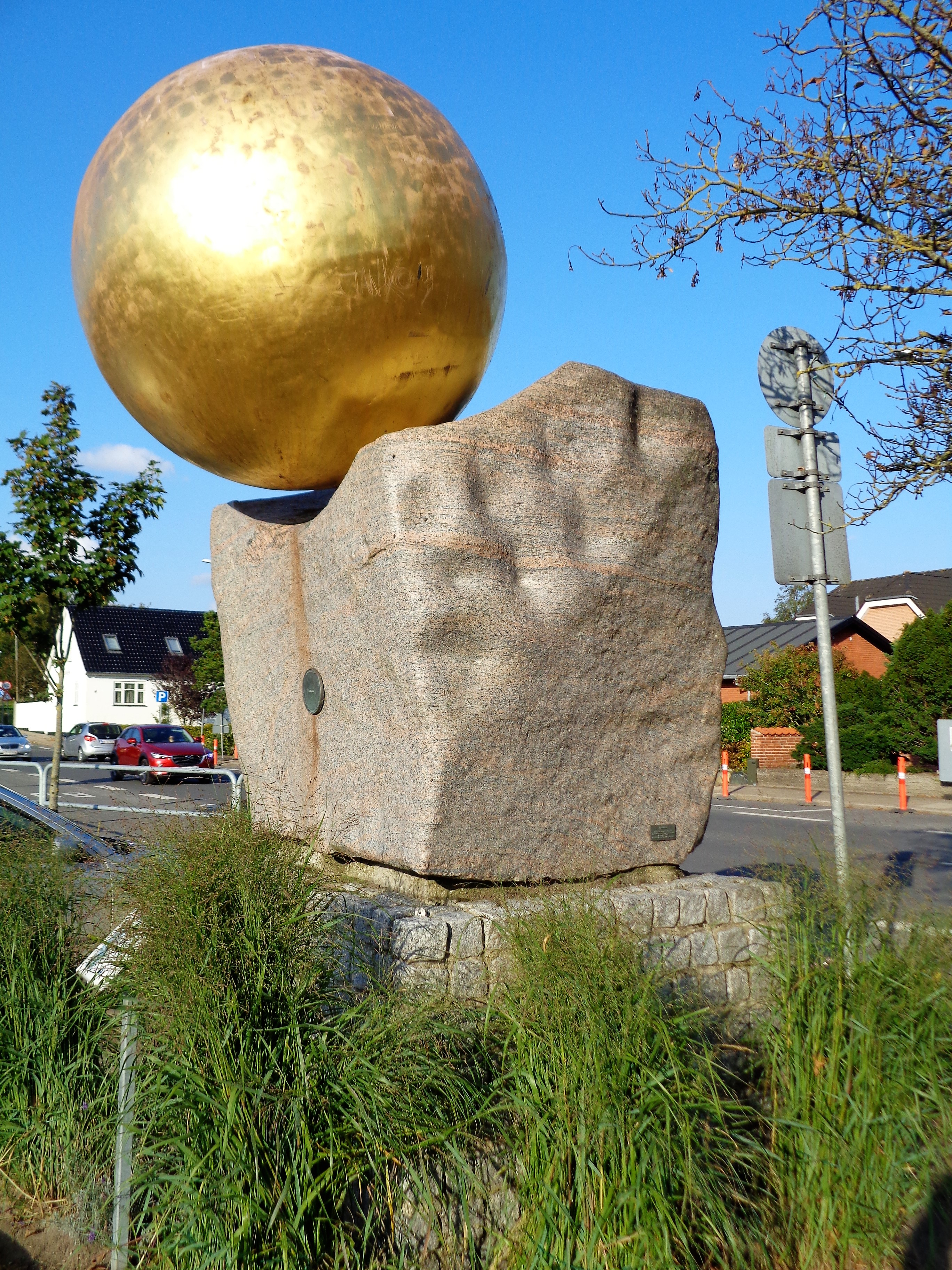 Das Modell der Sonne auf dem Planetenweg in Fjerrislev, Dänemark. Die Kugel im Maßstab 1 : 1 Milliarde hat einen Durchmesser von 1,40 Meter und steht auf einem gemauerten Sockel. Etwas unterhalb der Bildmitte, zwischen dem Granitklotz und dem Sockel, ist ein 5-Kronen-Geldstück zu erkennen zum Größenvergleich mit den anderen Planeten.